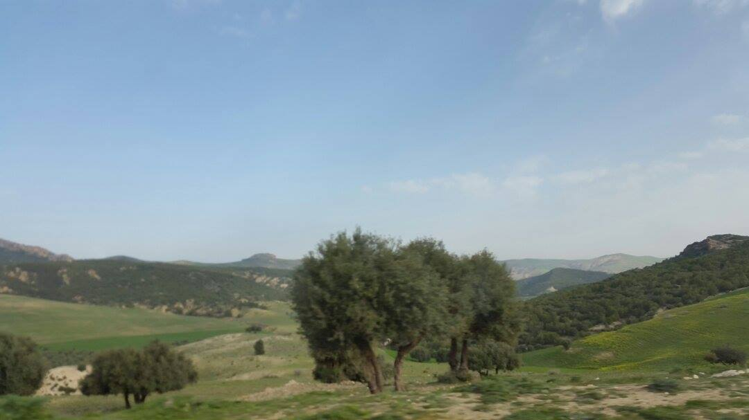 صورة لعين جمالة